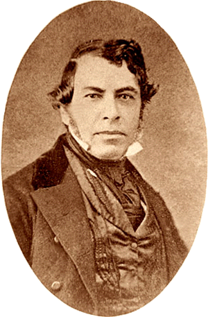 Ygnacio del Valle (1808-1880), California landowner (Rancho Camulos)